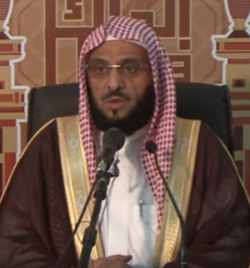 عائض القرني، داعية إسلامي سعودي